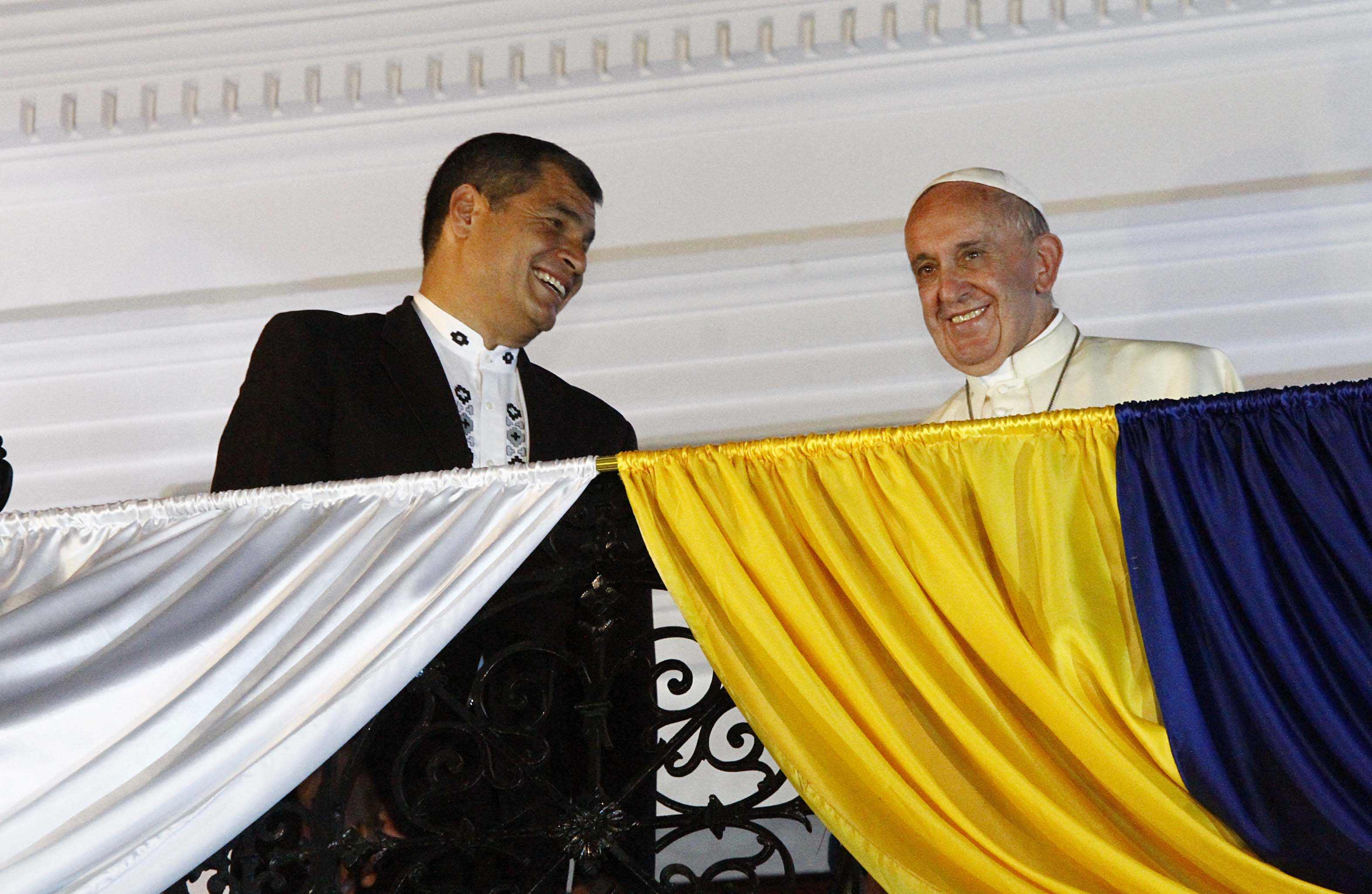 Quito, 06 jul (Andes).- El papa Francisco visitó el palacio de Carondelet donde mantuvo una reunión con el presidente de la República Rafael Correa. A su llegada se acercó al balcón para saludar y bendecir a los miles de fieles que se dieron cita en la Plaza Grande. ANDES/Micaela Ayala V.